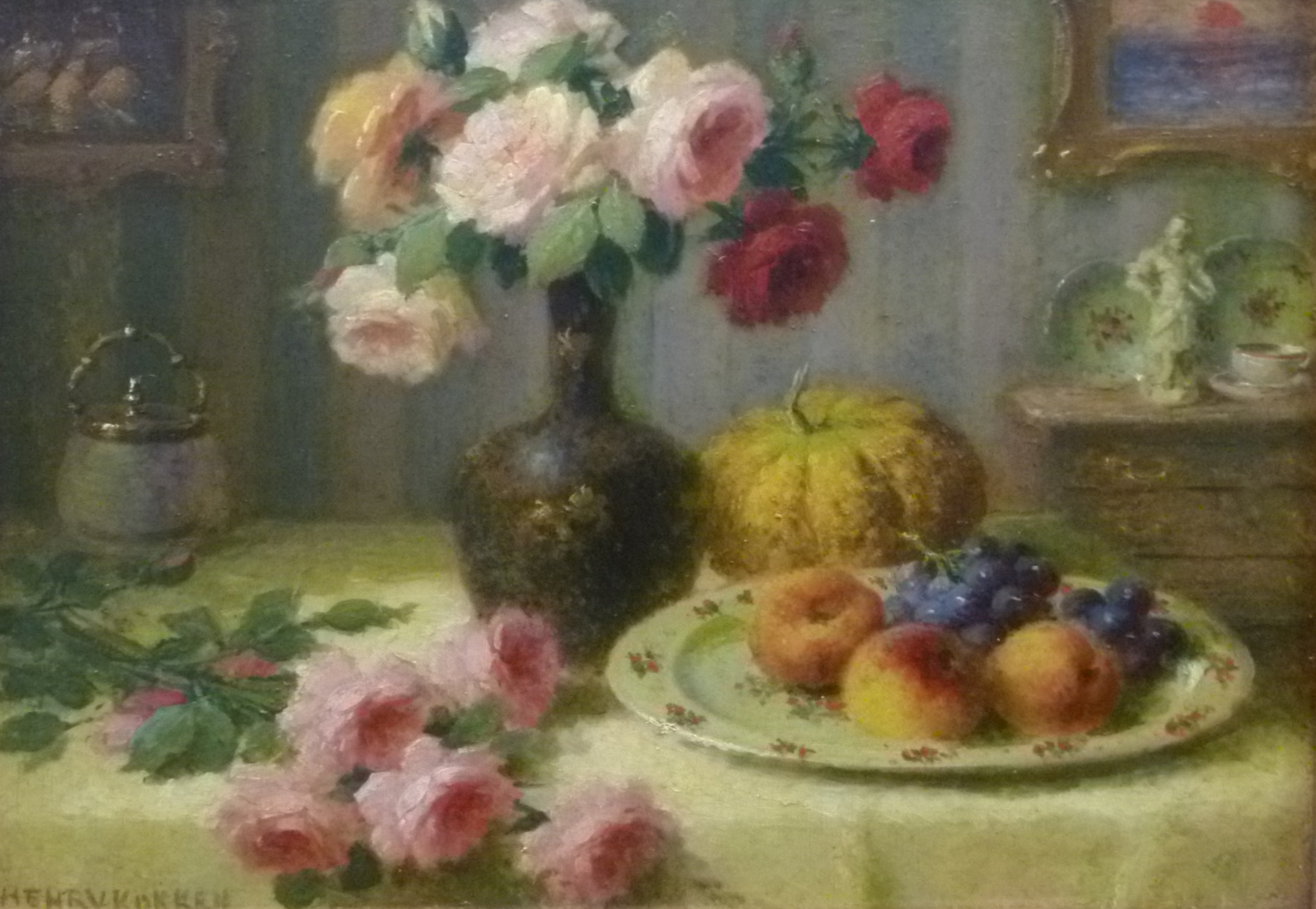 "Stilleven met rozen en fruit" , olieverf op paneel door Henry Kokken (1860-1941) ; 36 x 44 cm